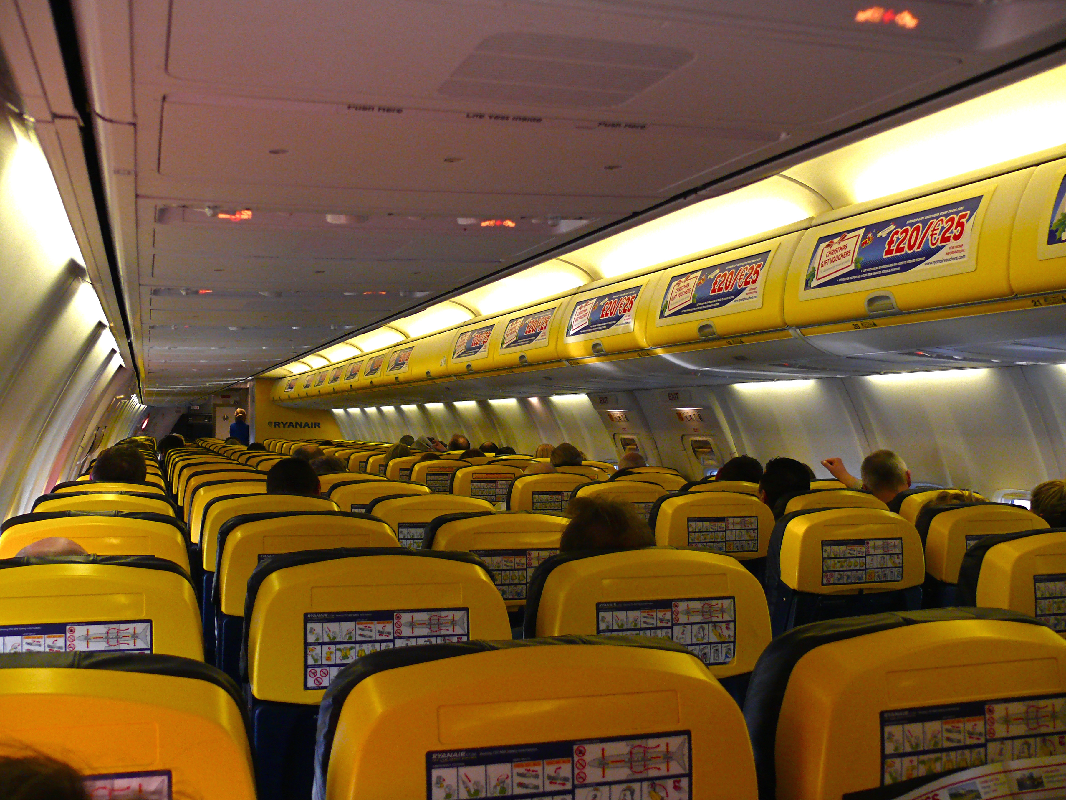 Ryanair B737-800 Cabin